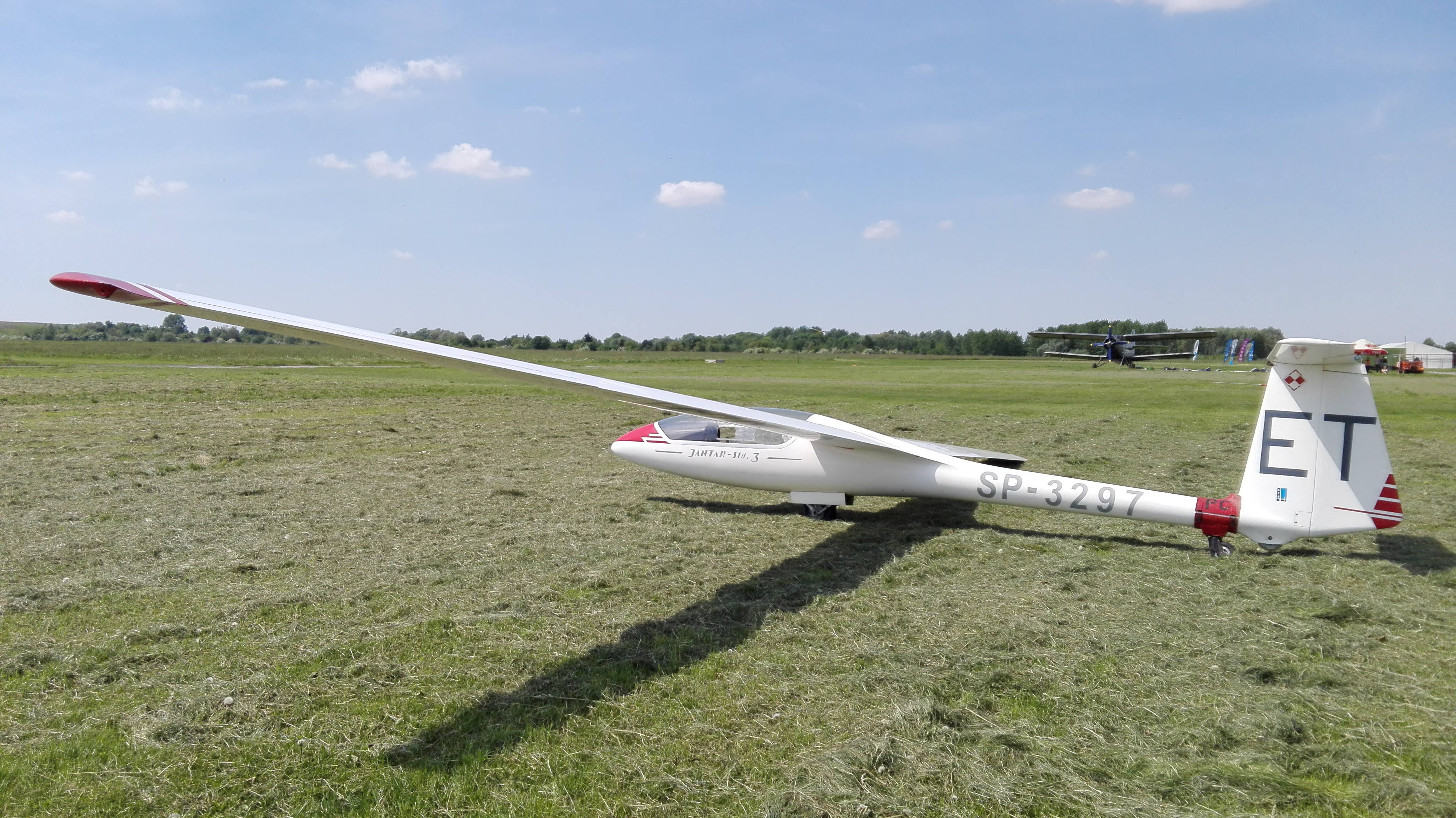 SZD-48 Jantar Standard SP-3297(ET)